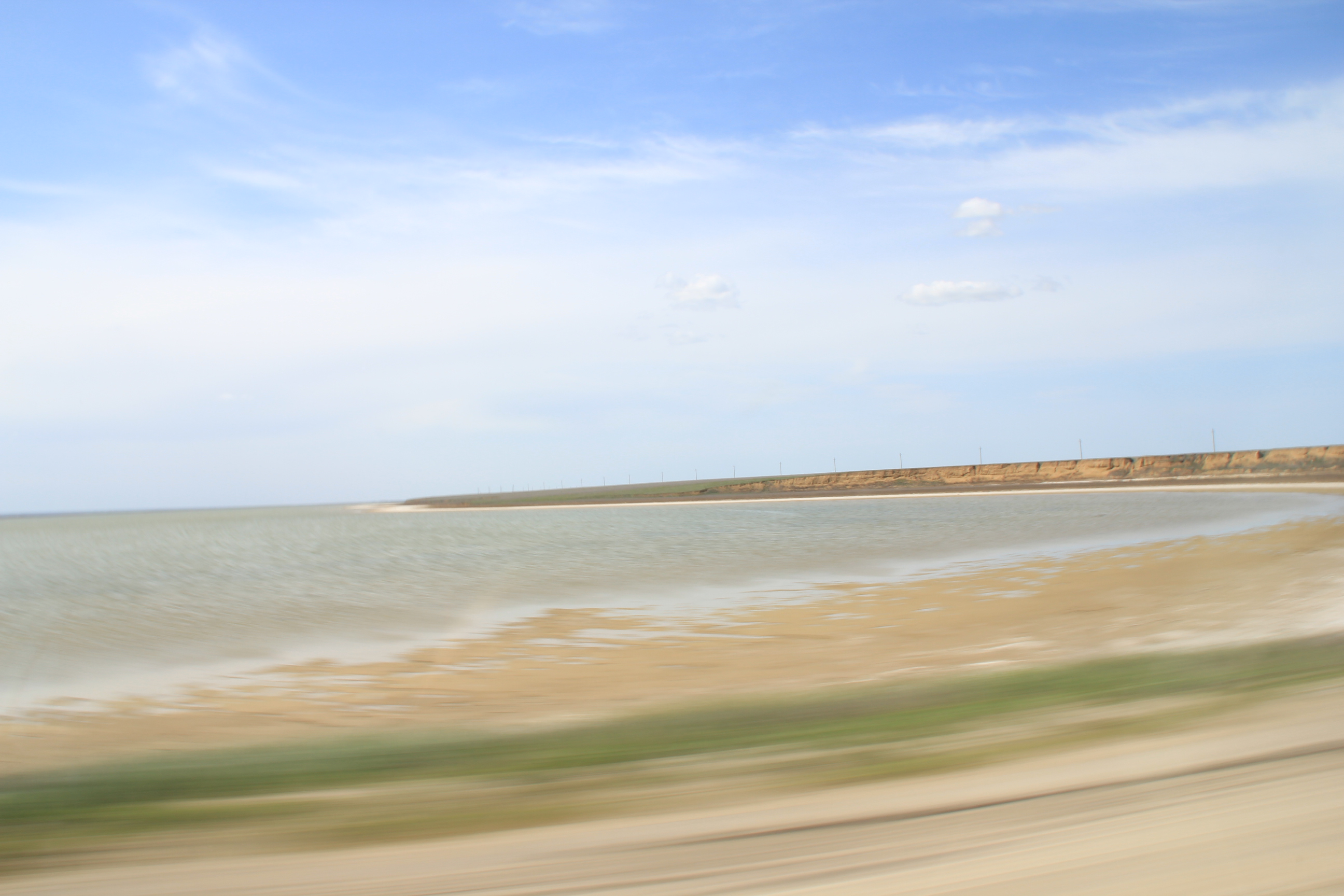 Маныч-Гудило (филиал заповедника Черные земли), Приютненский район This image is related to the protected area of Russia number 0800014